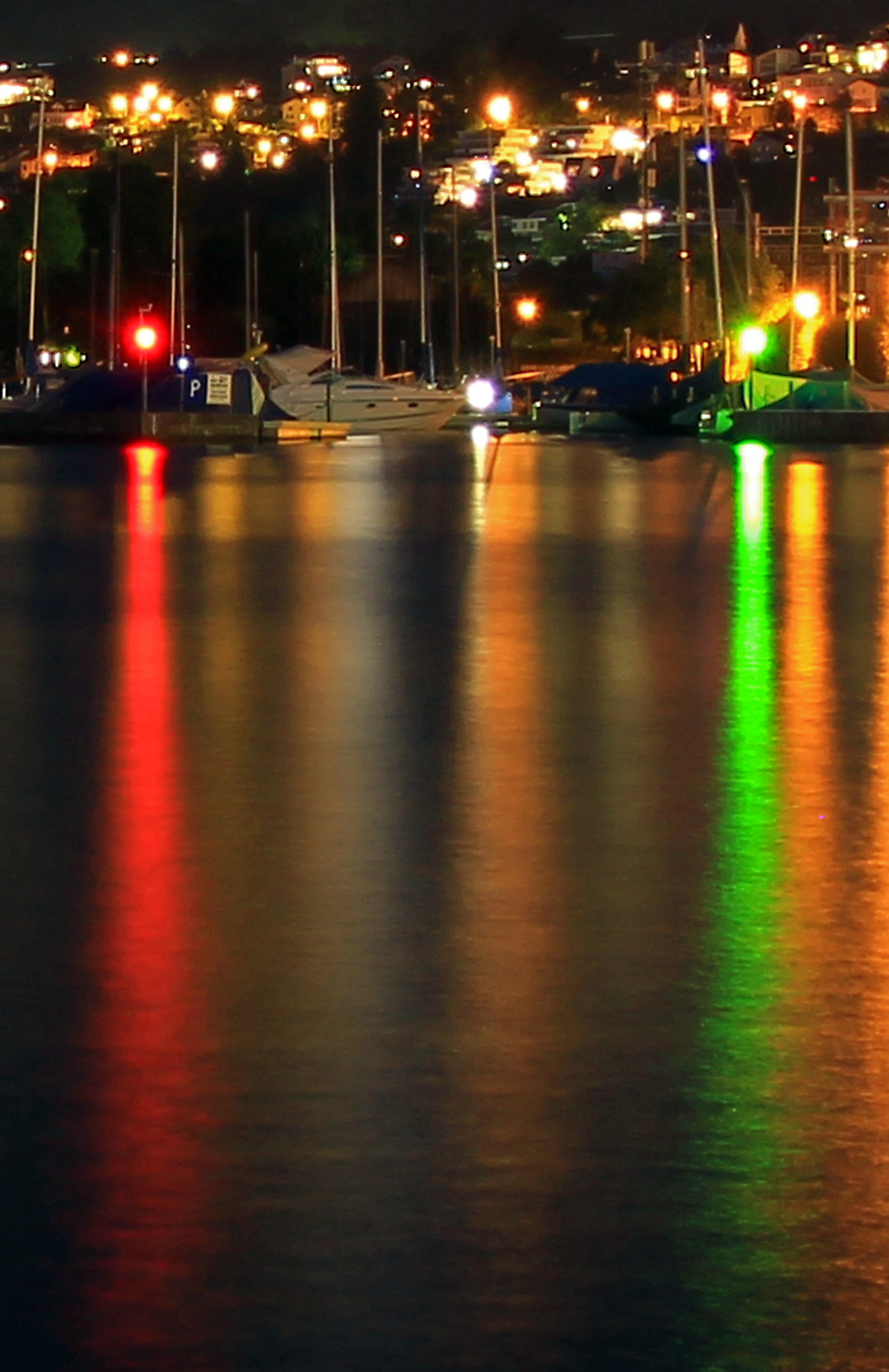 Richterswil Hafen